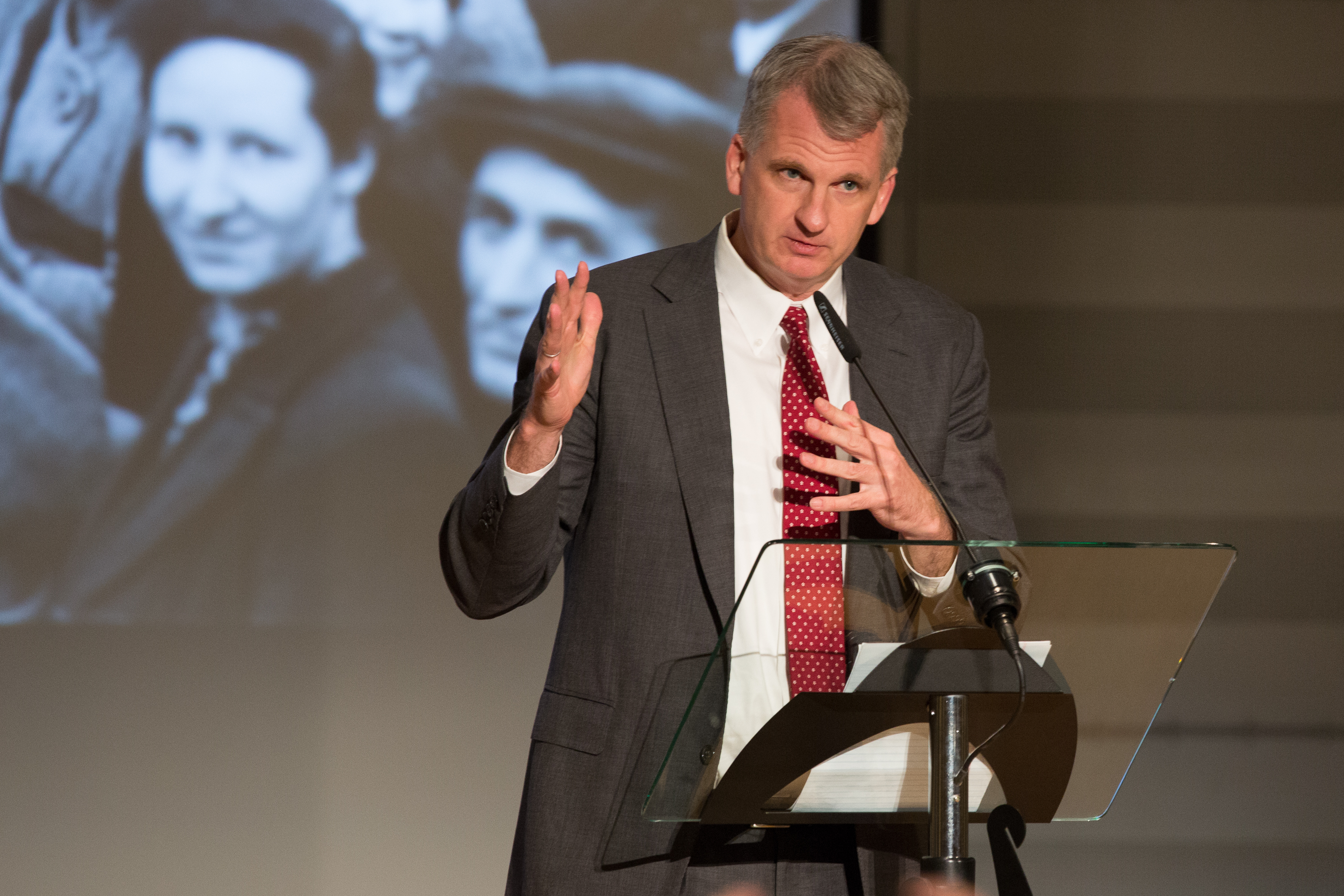 2015.gada 6.maijs. Saeimas priekšsēdētāja Ināra Mūrniece vizītes Briselē ietvaros piedalās konferencē „Karš un miers. 1945 – 2015” Eiropas Parlamentā. Foto: Ernests Dinka, Saeimas Kanceleja